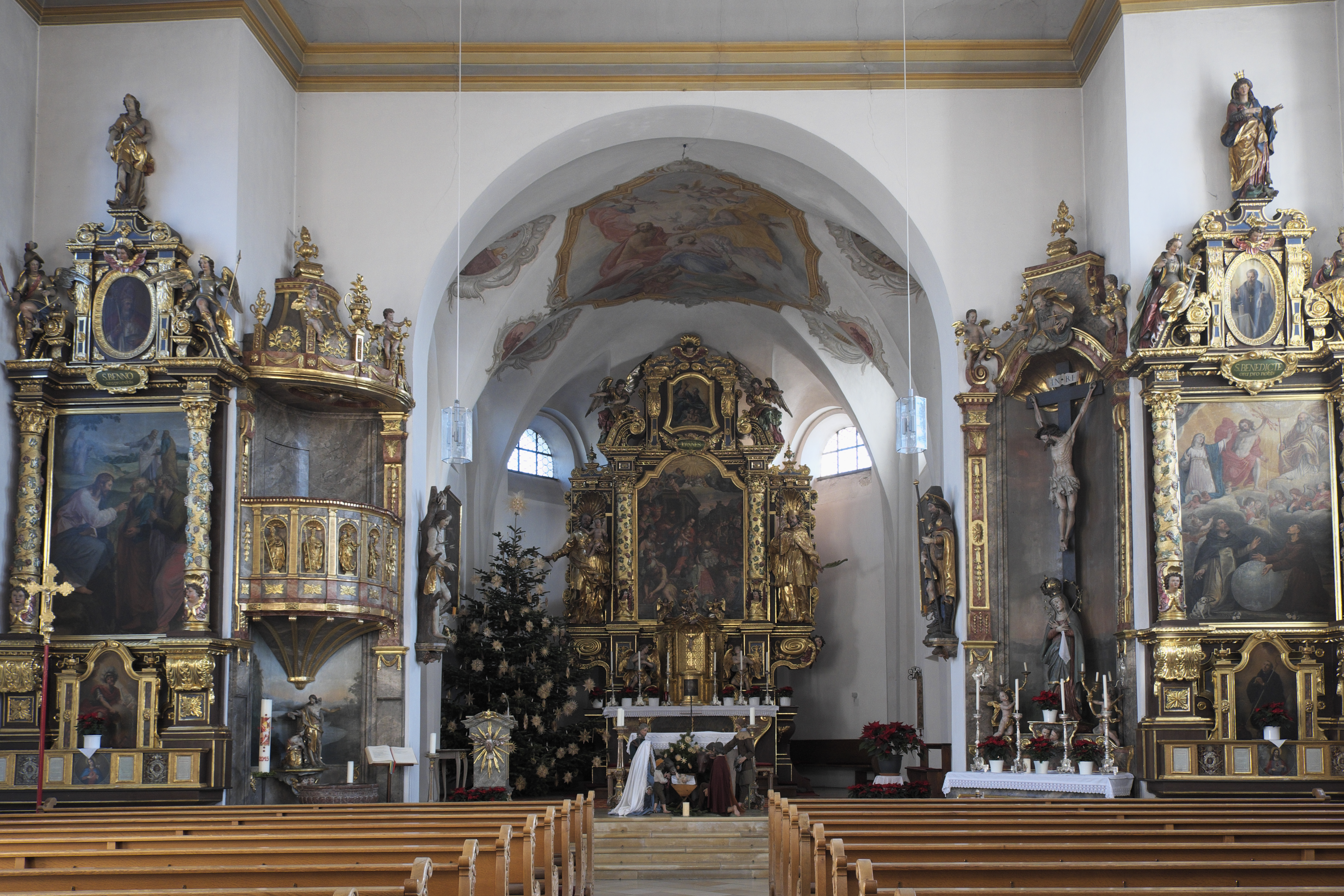 Katholische Pfarrkirche St. Johannes Evangelist in Hohenkammer im Landkreis Freising (Bayern/Deutschland), Innenraum